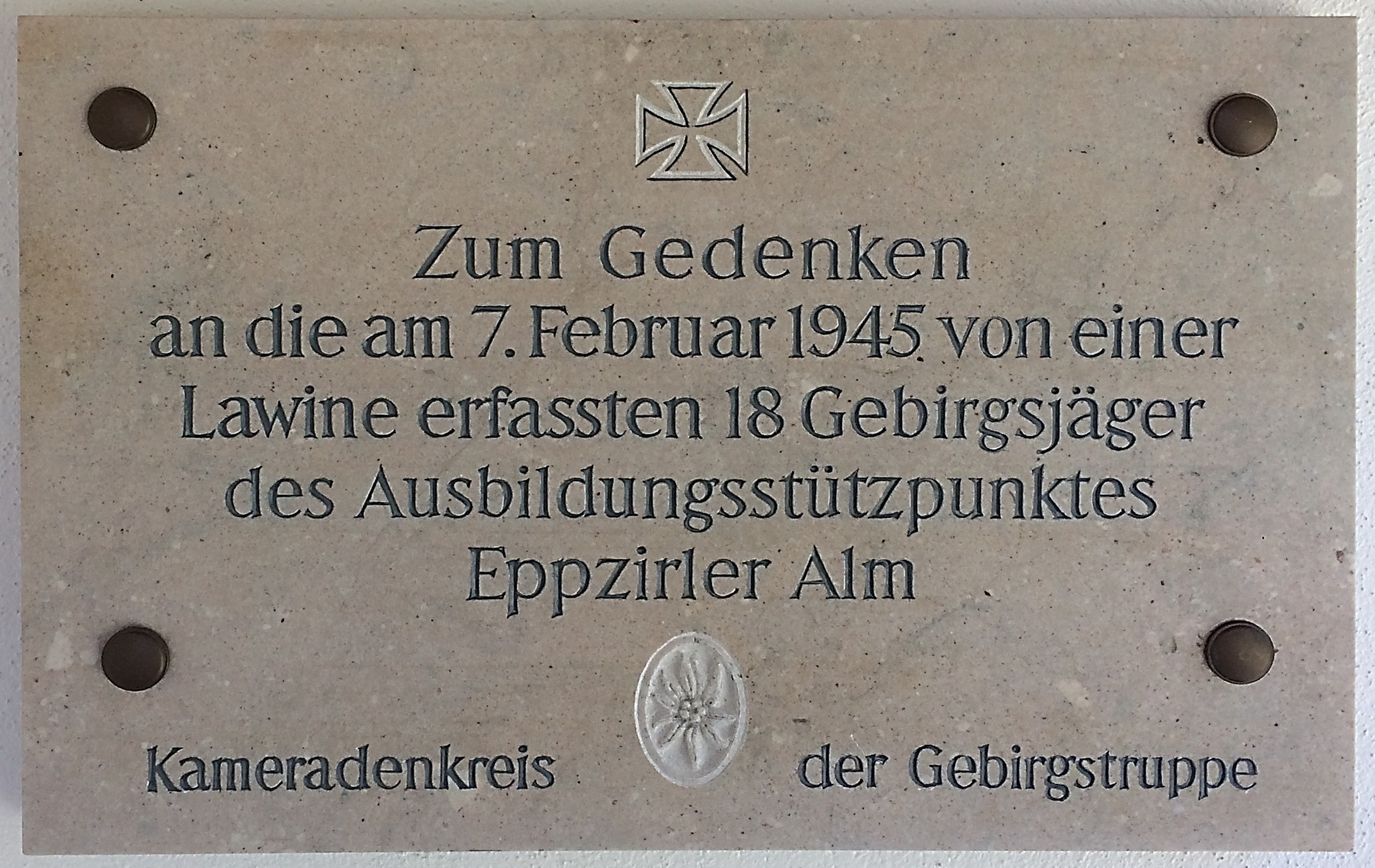 Gedenktafel für die 18 Lawinenopfer vom 7. Februar 1945 auf der Eppzirler Alm